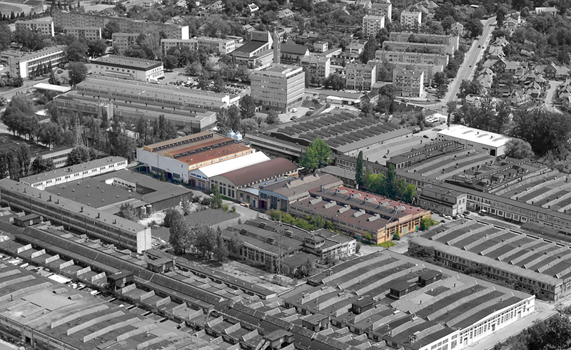 Starachowice - Per-Eko Zakład Produkcyjny nr 1